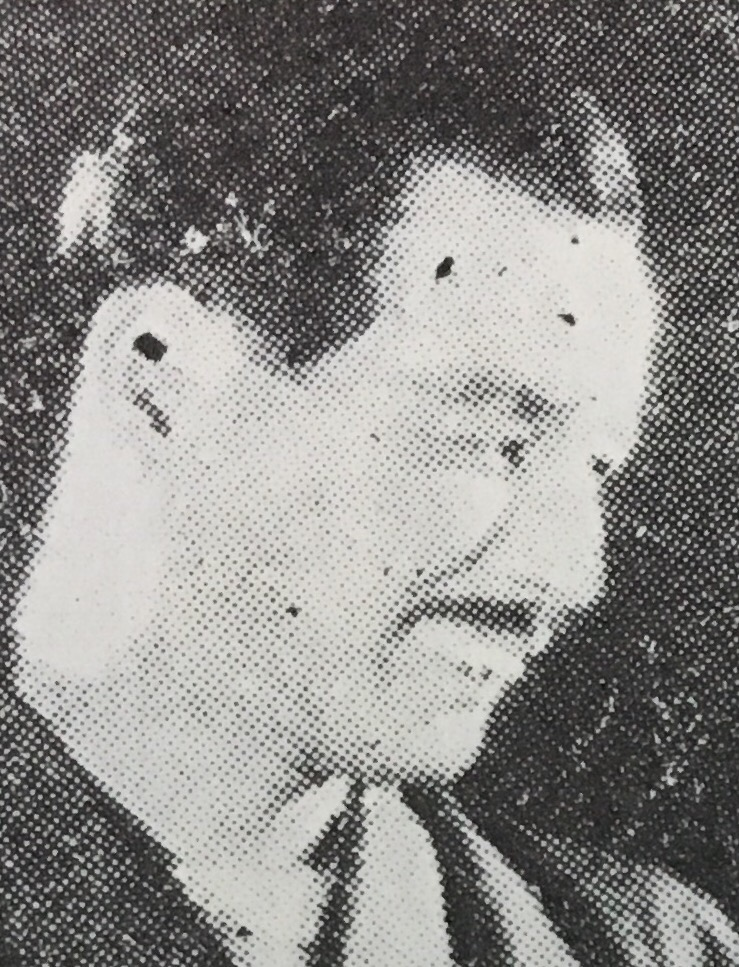 1928年の写真。